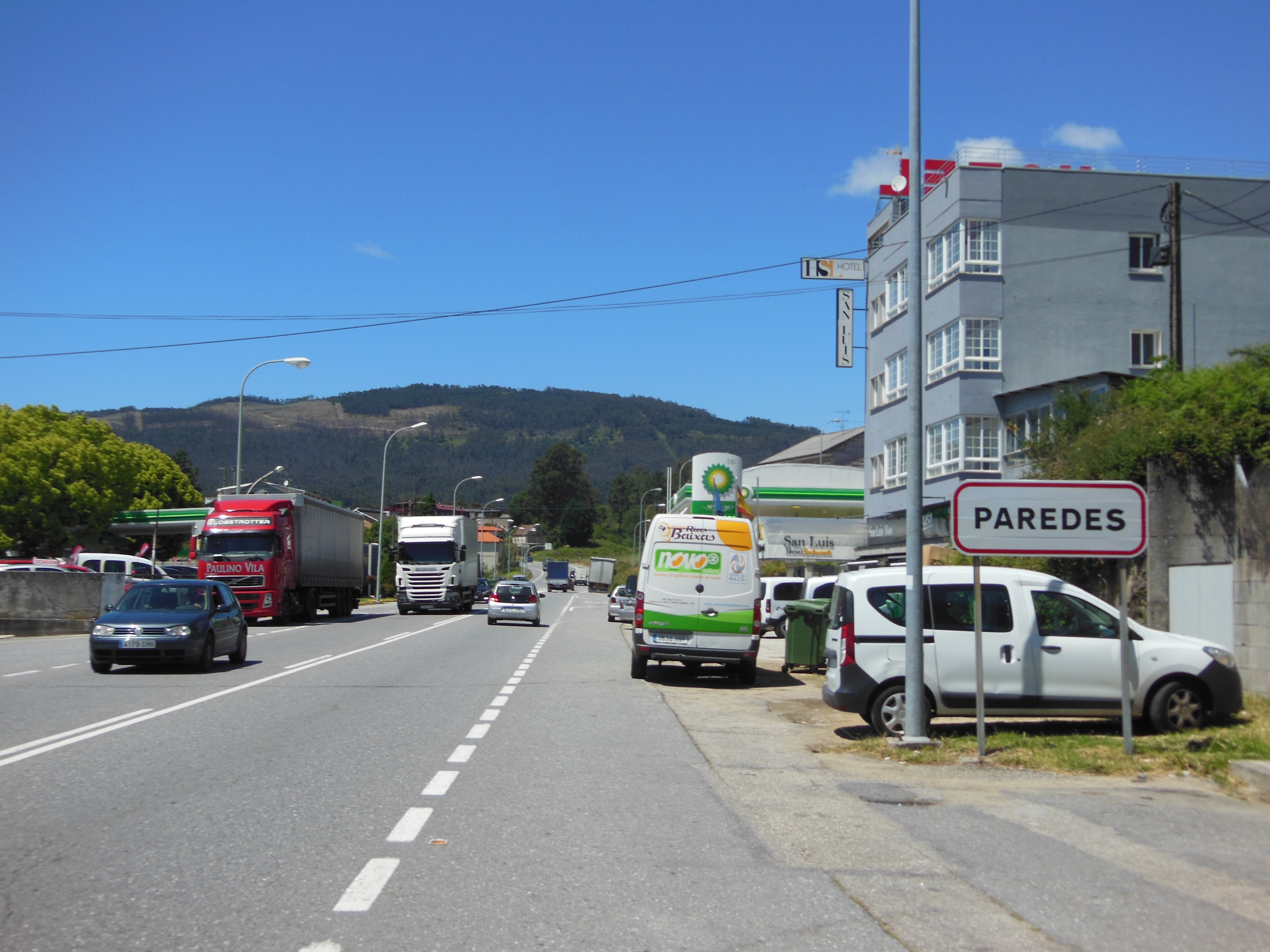 Estrada N-550 en Paredes